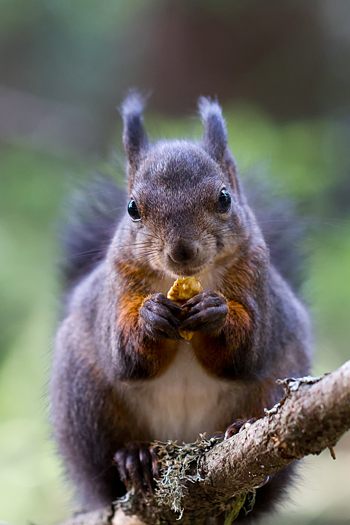 Eichhörnchen, Arosa, Graubünden, Schweiz